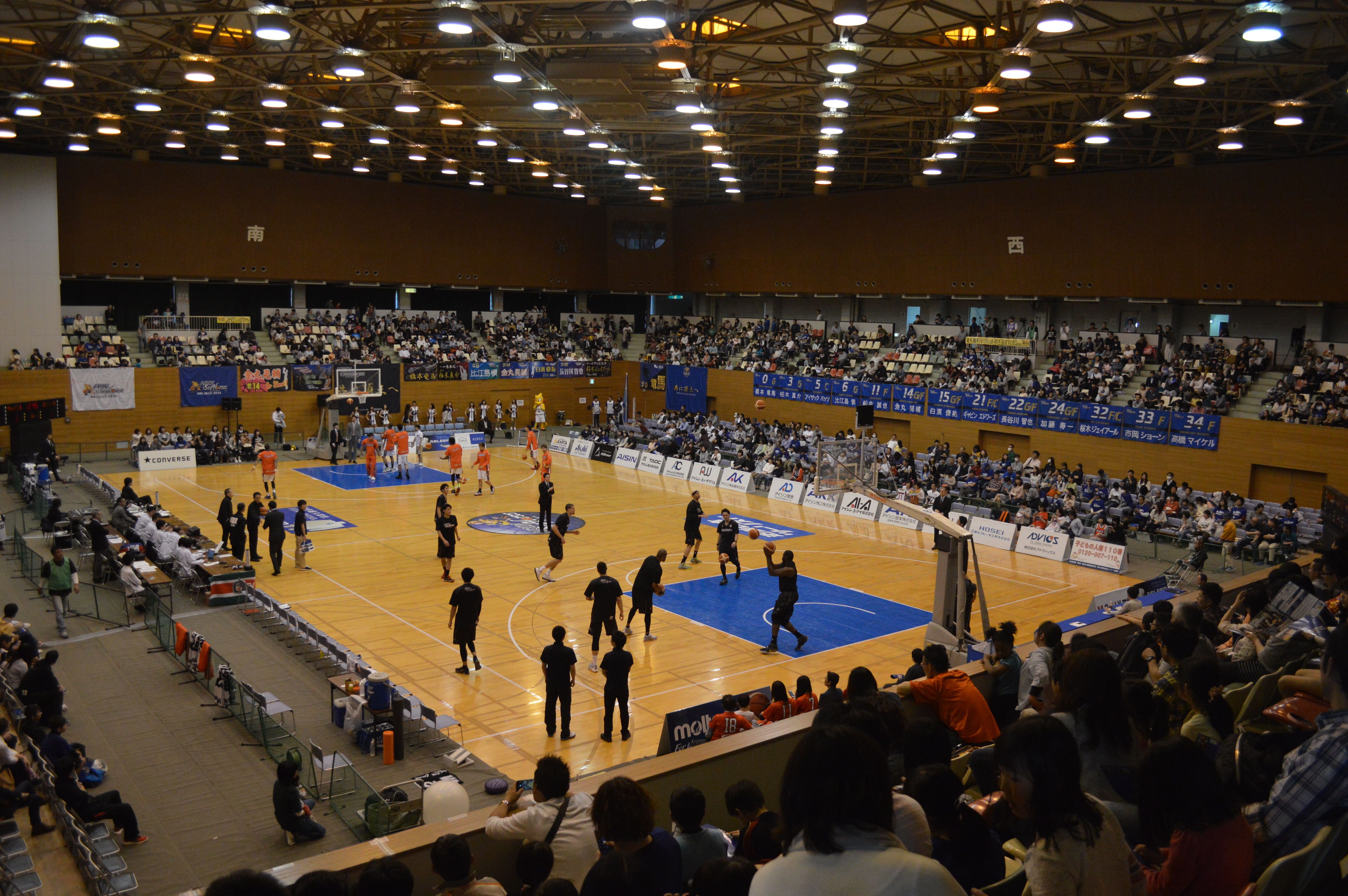 2015-16 NBL アイシンシーホース三河vs広島ドラゴンフライズ 刈谷市体育館